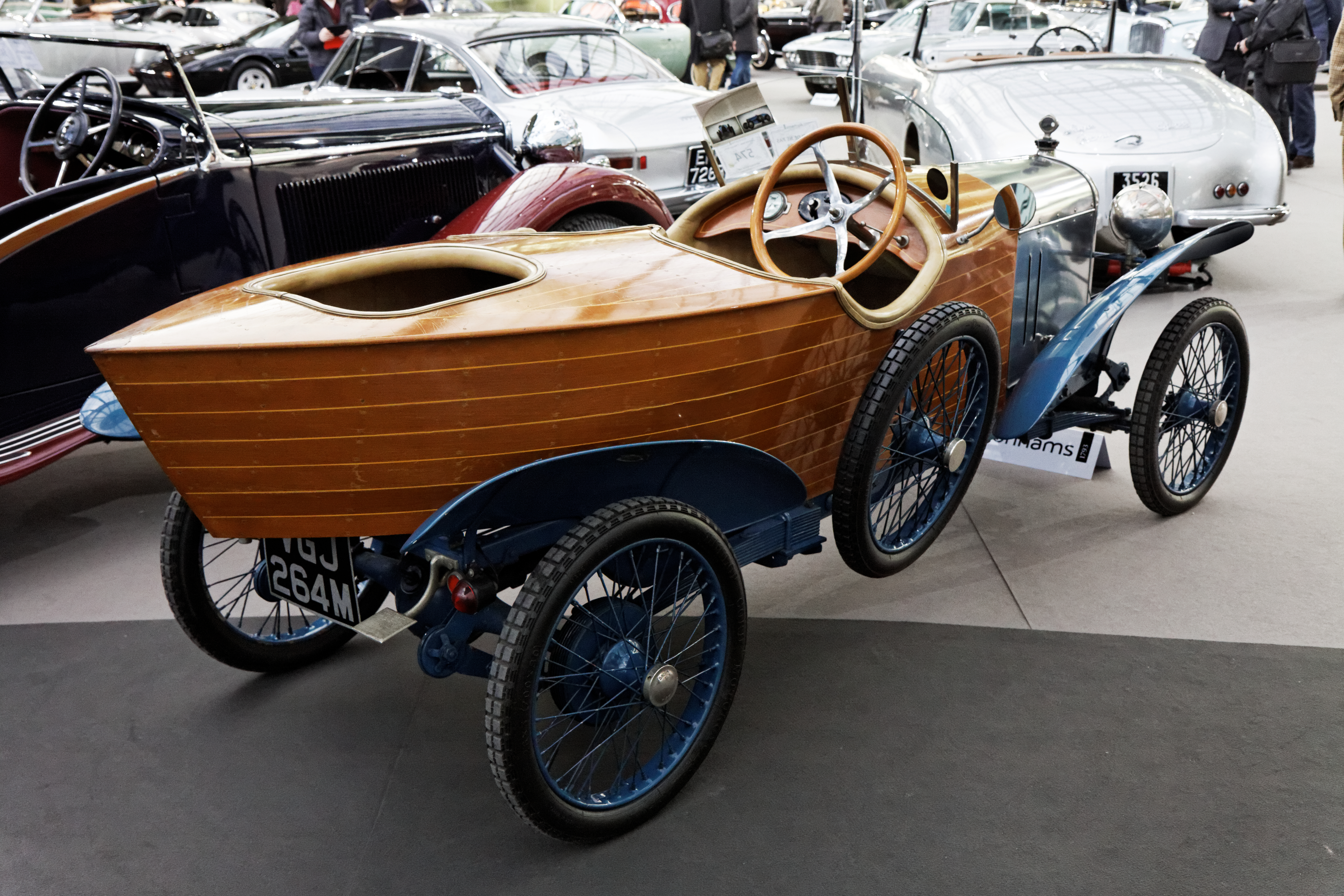 Une Amilcar type 4C skiff de 1922.